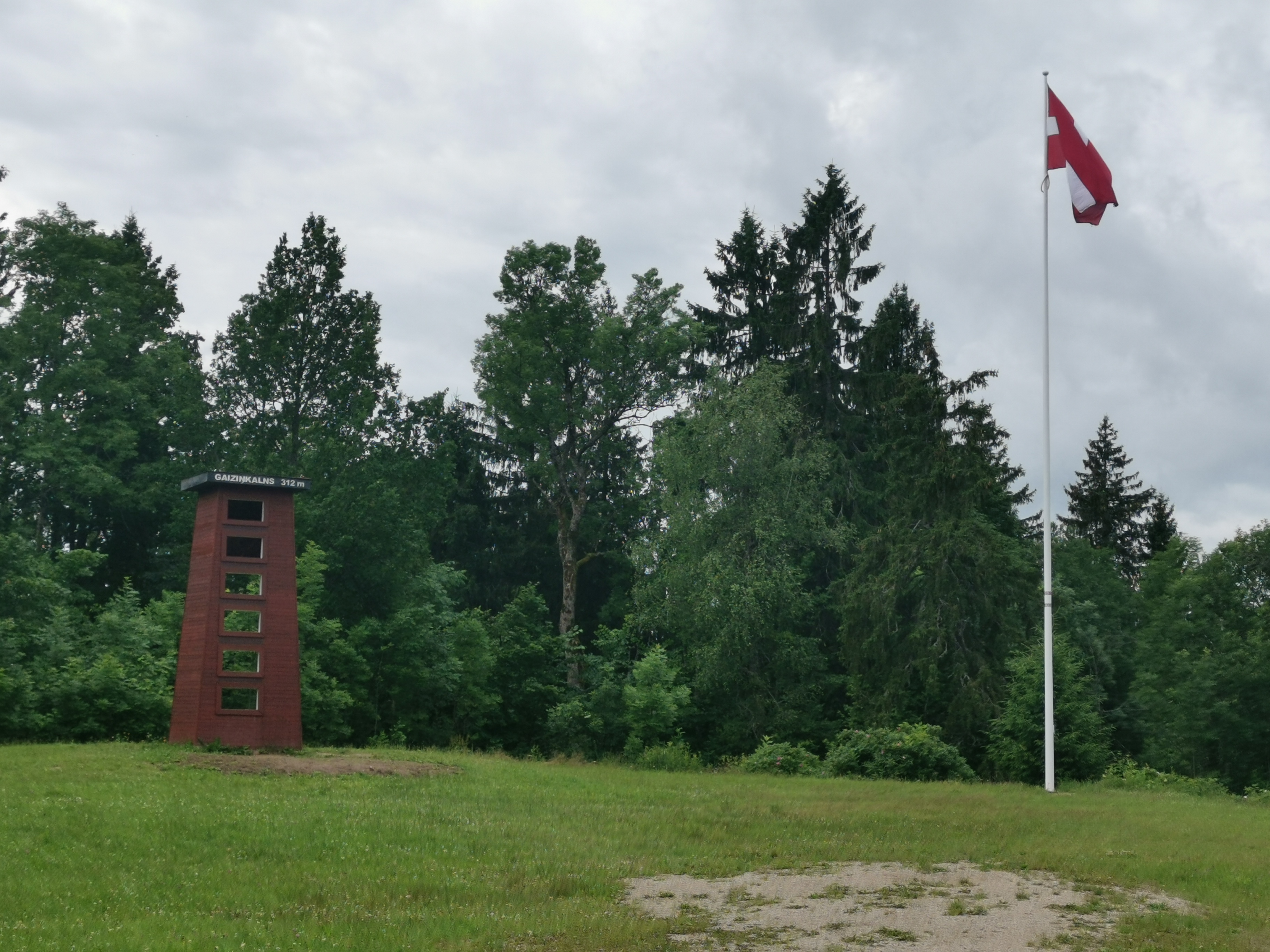 Gaiziņkalna augstākā vieta